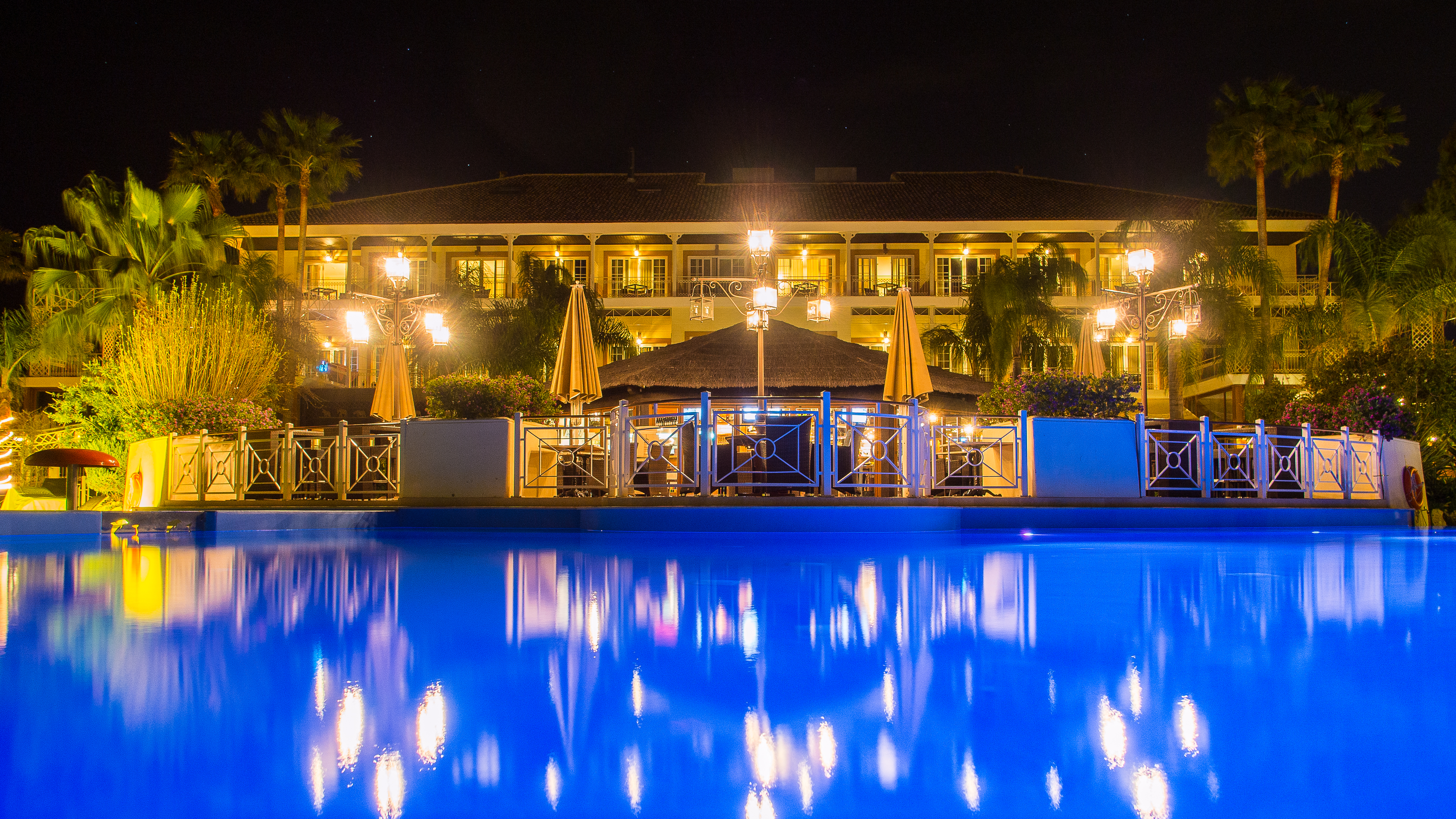 Lindner Golf Resort Portals Nous, Mallorca